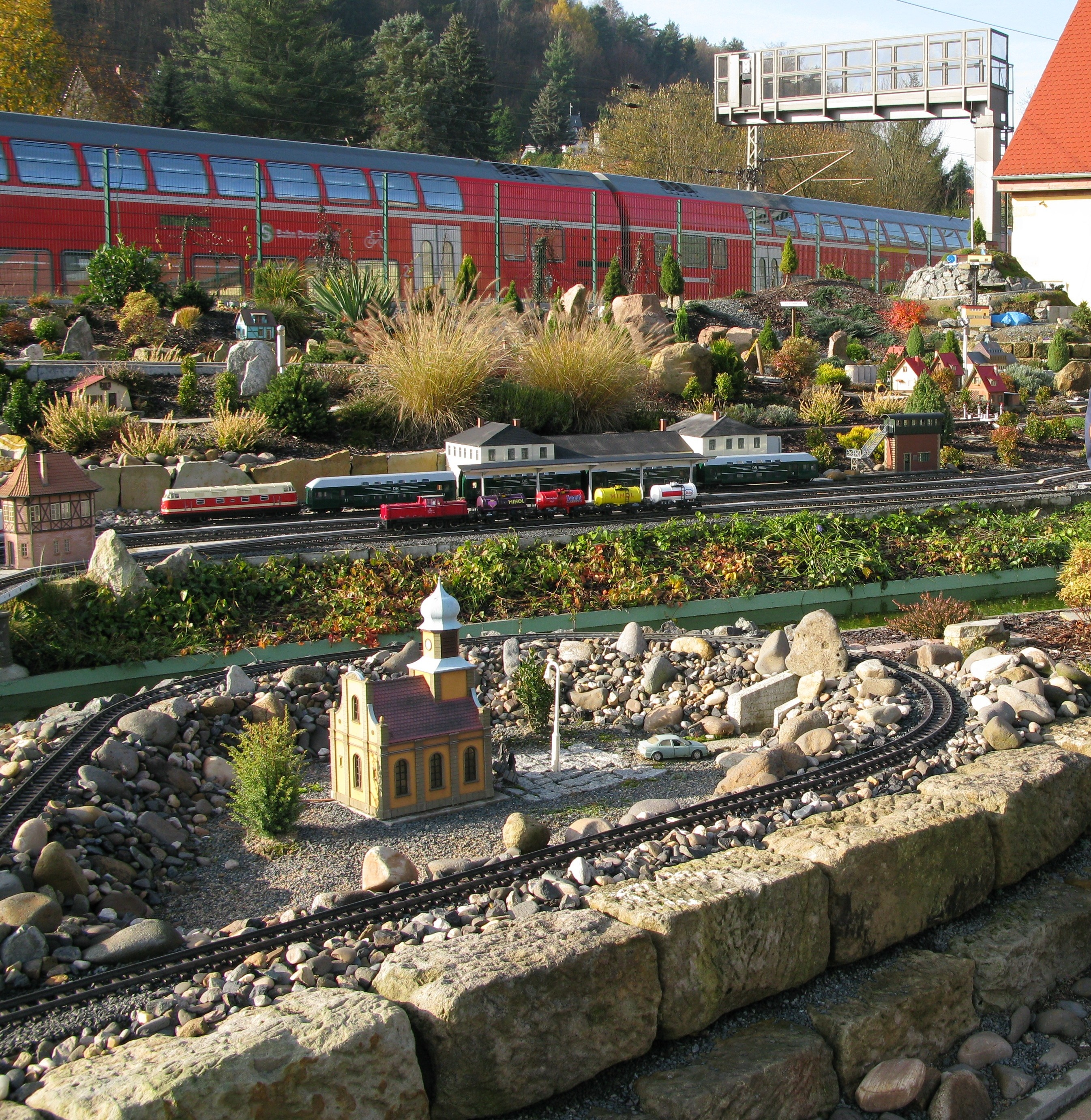 Eisenbahnwelten im Kurort Rathen. In der Mitte des Bildes die Nachbildung des Bahnhofs Pirna, im Hintergrund ein echter Zug auf der Elbtalbahn